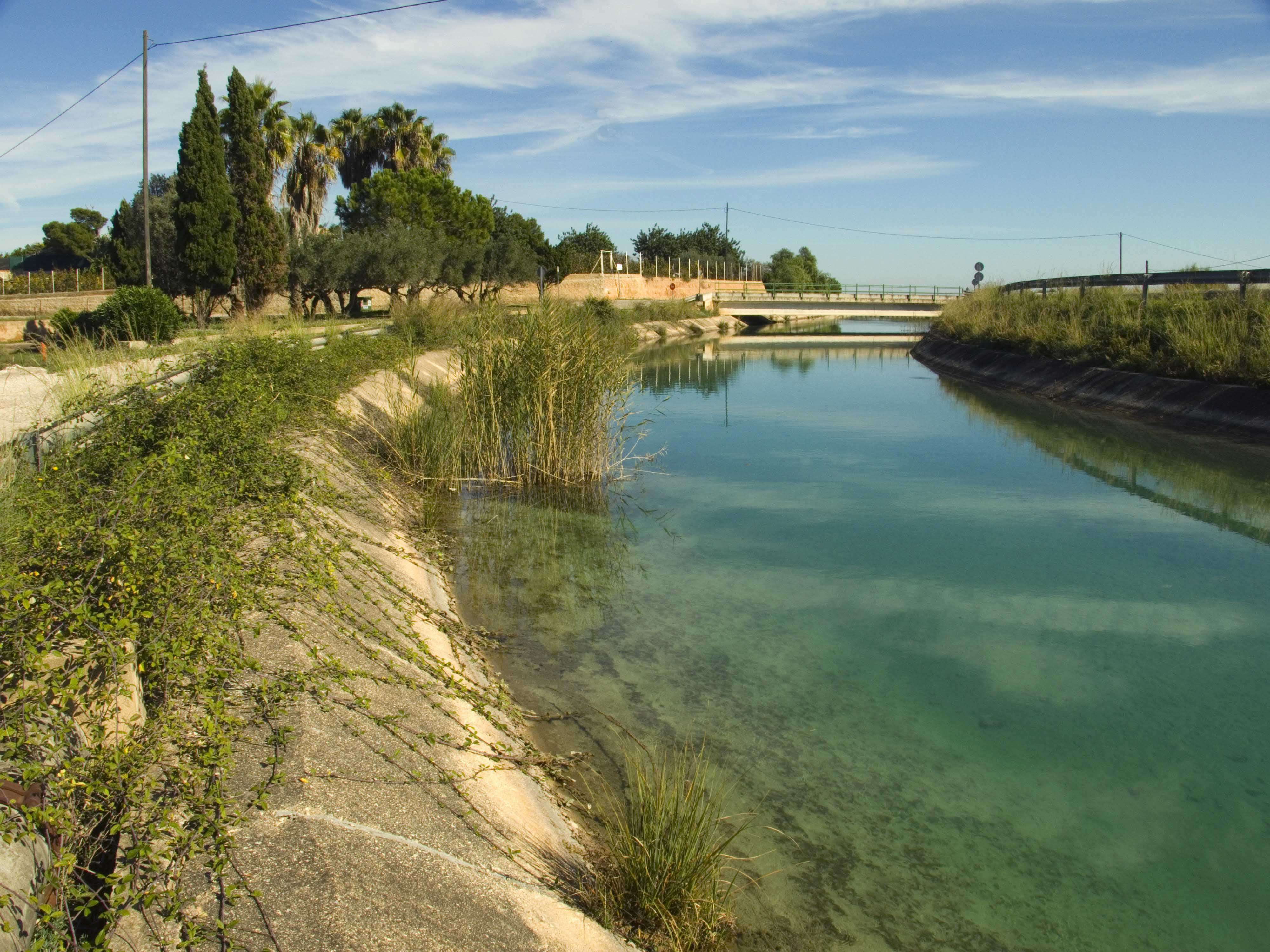 Canal Xúquer-Túria quan passa per Alginet.